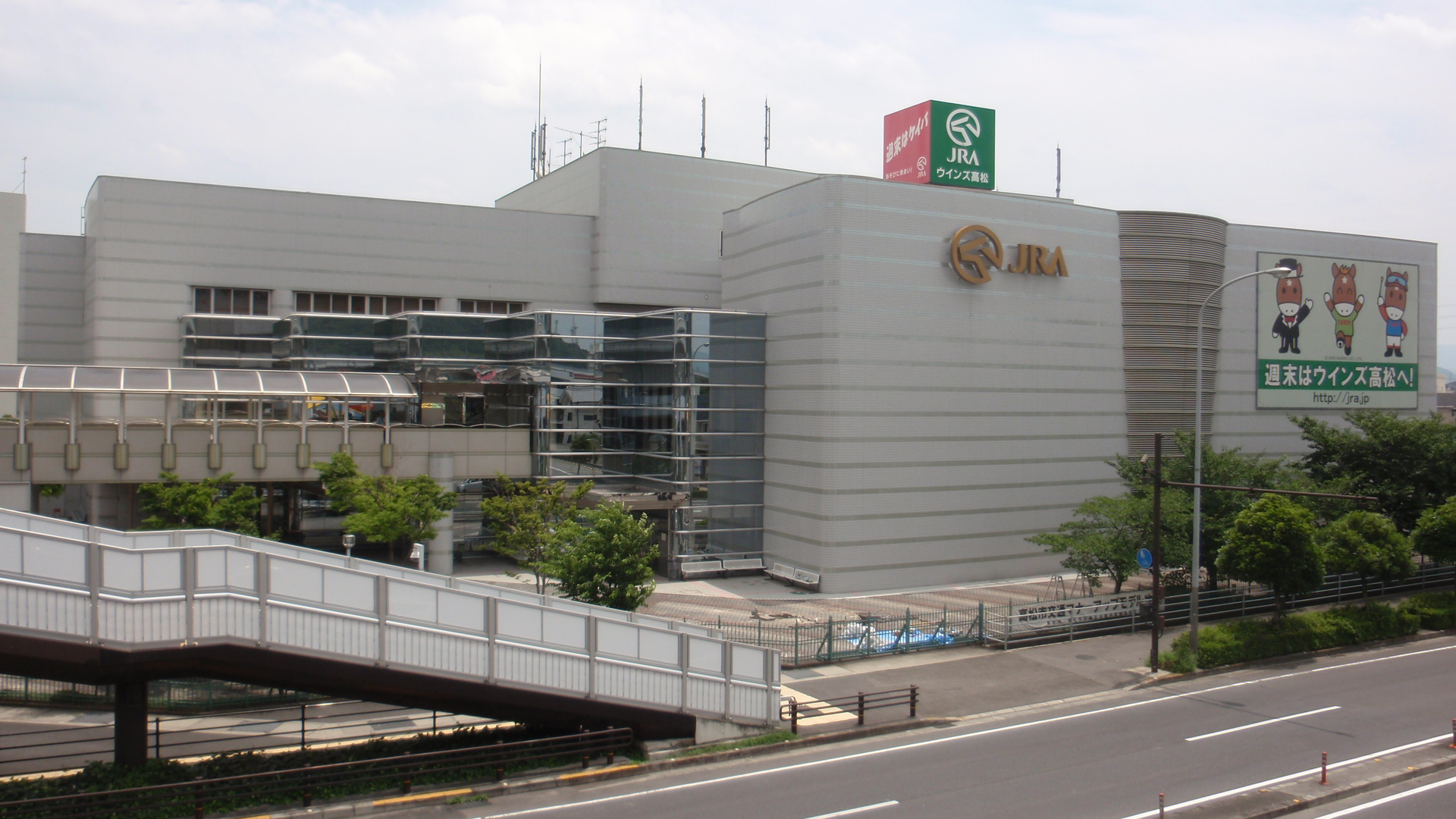 香川県高松市にある場外馬券場「ウインズ高松」